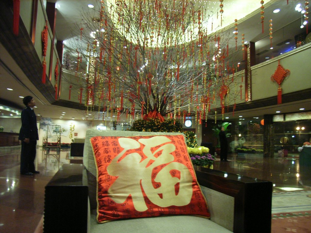 中國大酒店(廣州) CHINA HOTEL, GUANGZHOU, CHINA (by Zha Nai HO).